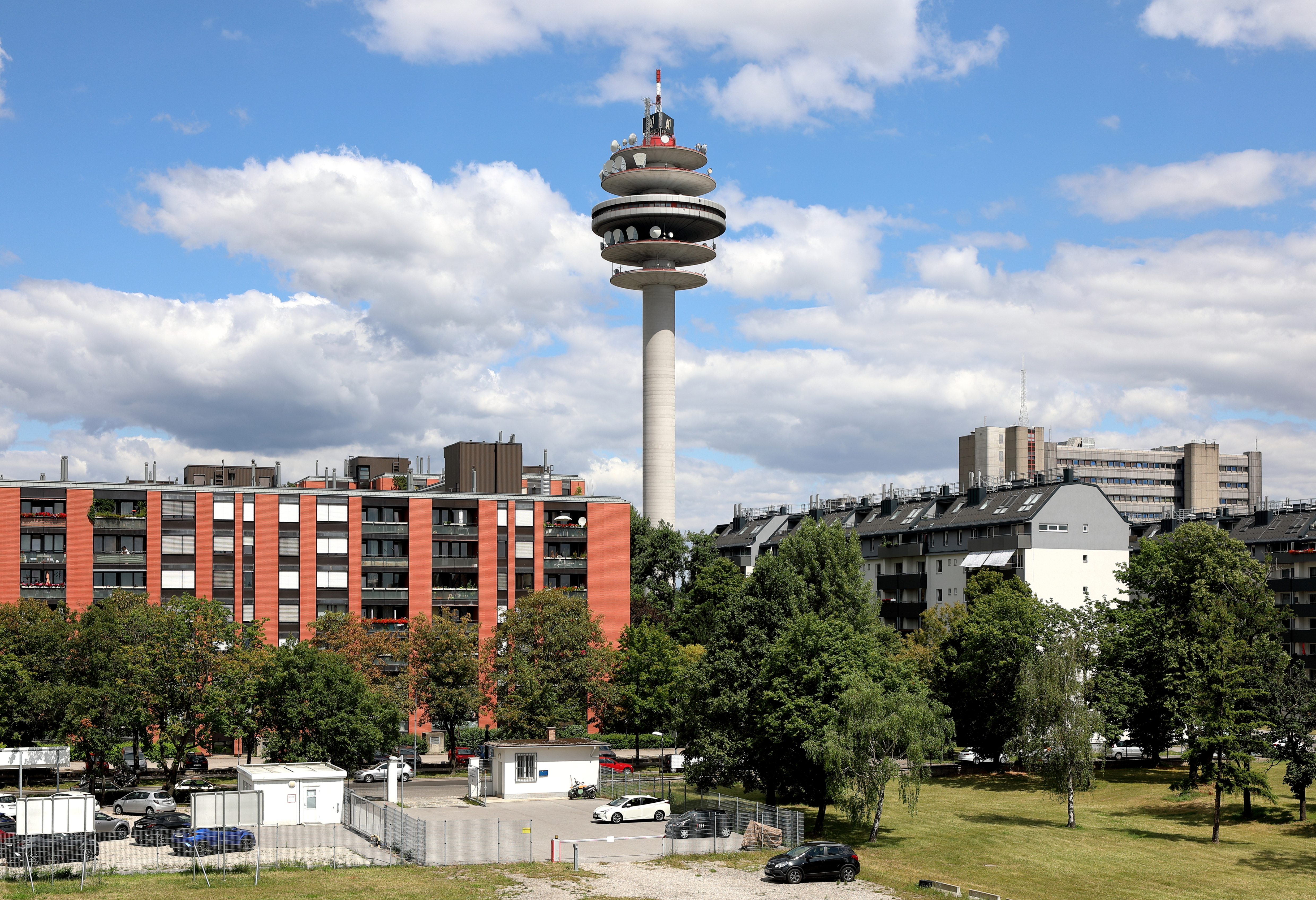 Der Richtfunkturm des Fernmeldezentrums Arsenal der A1 Telekom Austria an der Adresse Arsenal 22 im 3. Wiener Gemeindebezirk Landstraße.Der Turm, früher auch als Postturm bezeichnet, wurde nach Plänen des Architekten Kurt Eckel und des Statikers Robert Krapfenbauer im Zuge der Errichtung eines Fernmeldezentrums gebaut und 1978 offiziell in Betrieb genommen. Er hat eine Gesamthöhe von 155 m, davon einen 136,6 m hohen Stahlbetonschaft und eine 18,4 m hohe Stahlantenne.